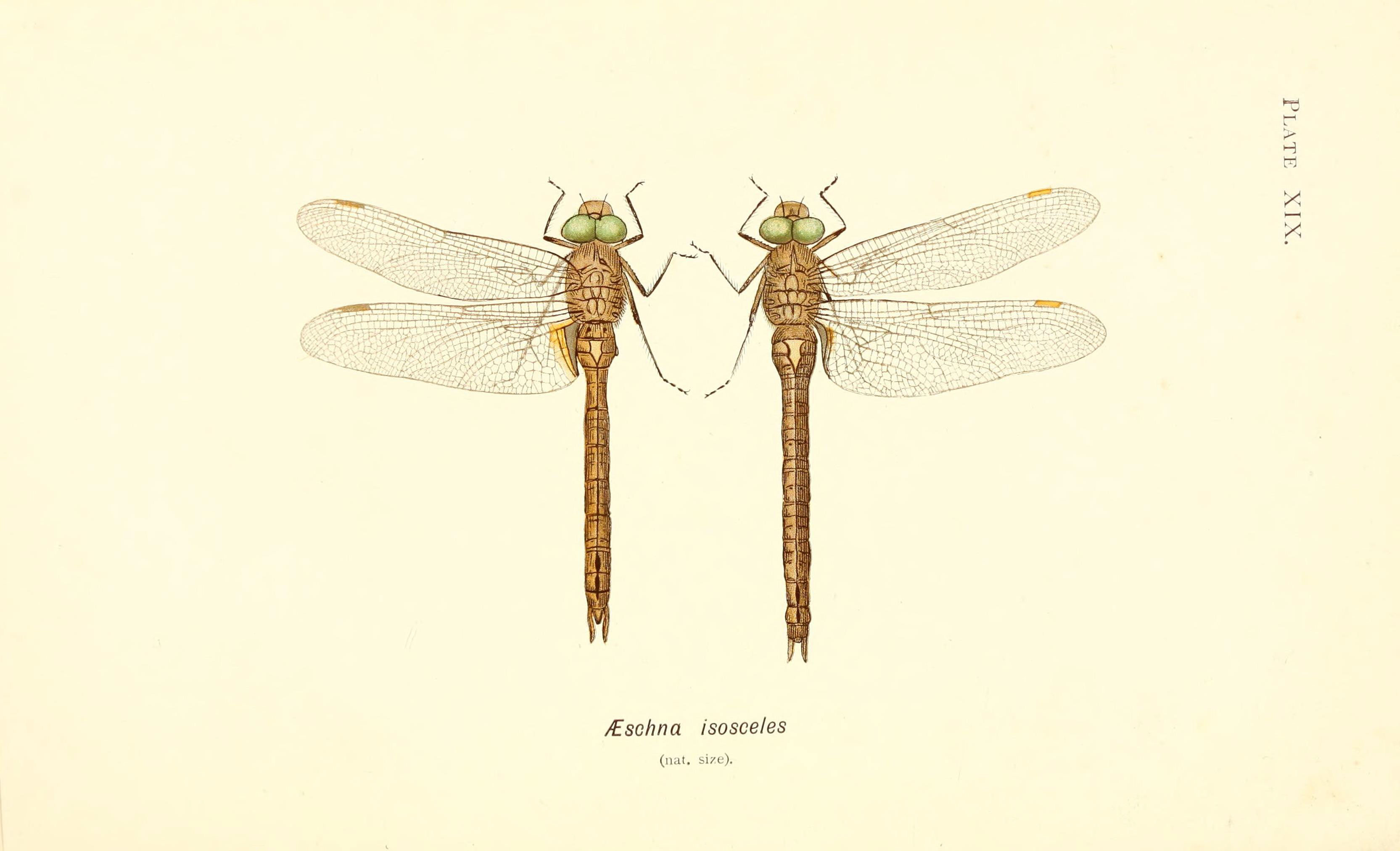 Plate XIX. cs s: o CO